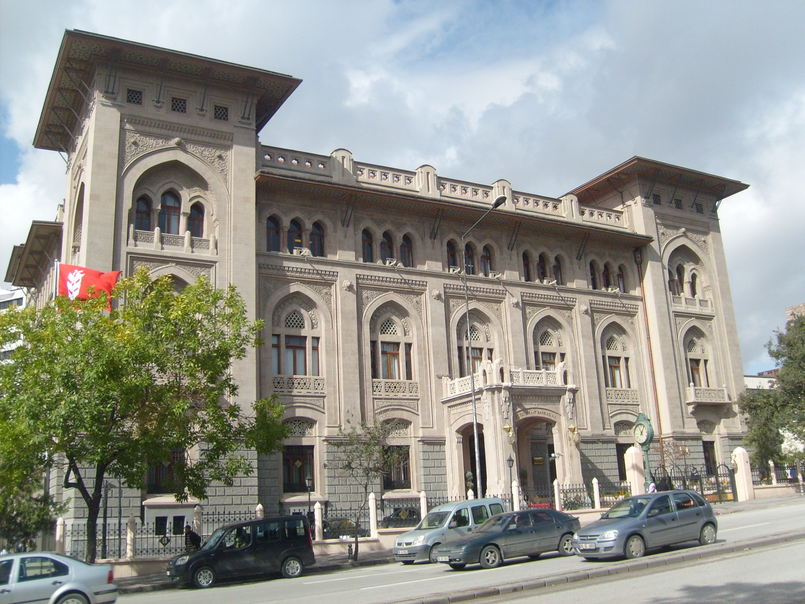 T.C Ziraat Bankası Genel Müdürlük binası. 1926-1929 yılları arasında İtalyan Mimar Giulio Mongeri tarafından inşa edilmiştir.